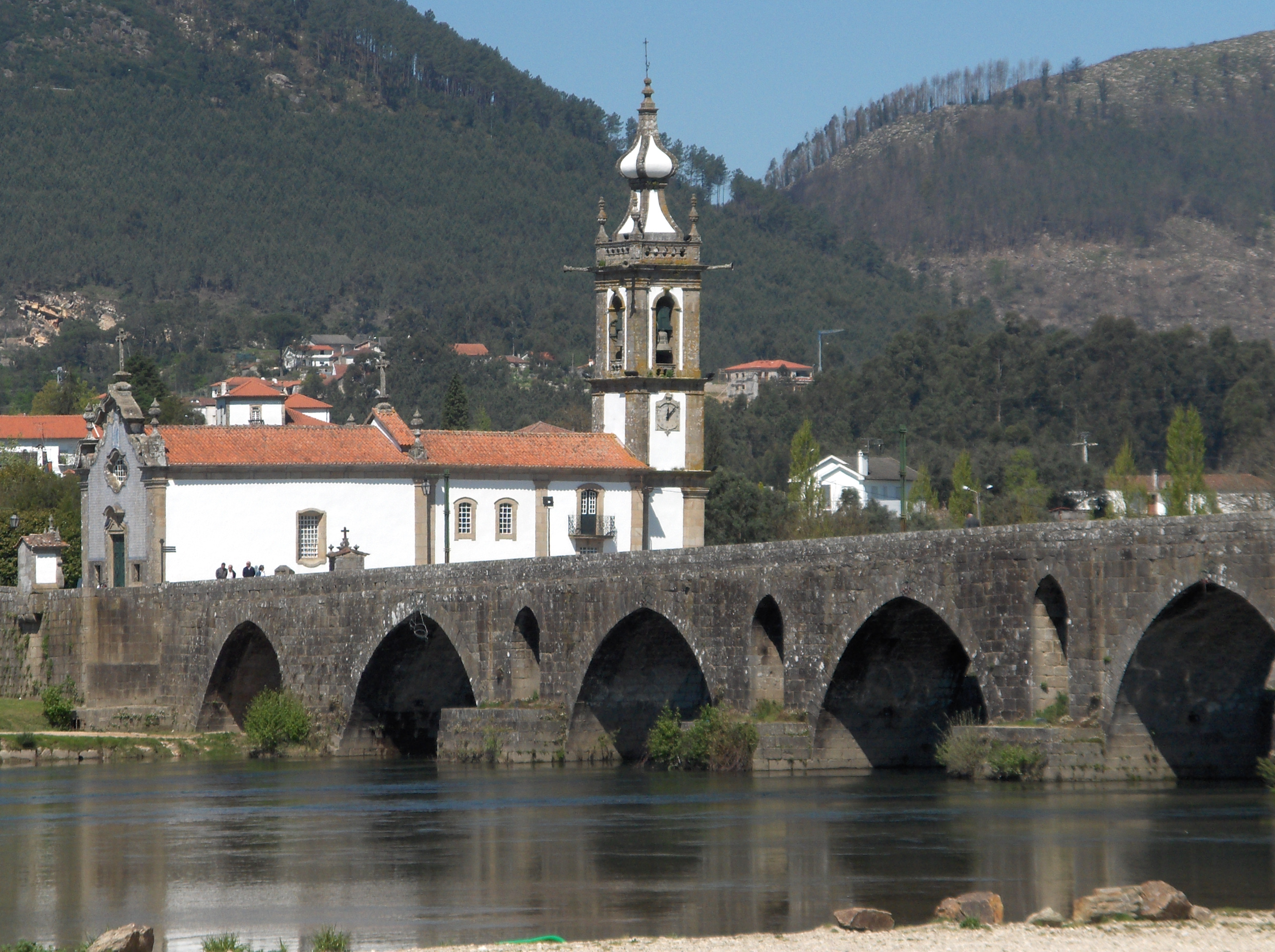 Igreja de Santo António da Torre Velha, freguesia, cidade e concelho de Ponte de Lima, concelho de Viana do Castelo, Portugal. i am the author of this work.